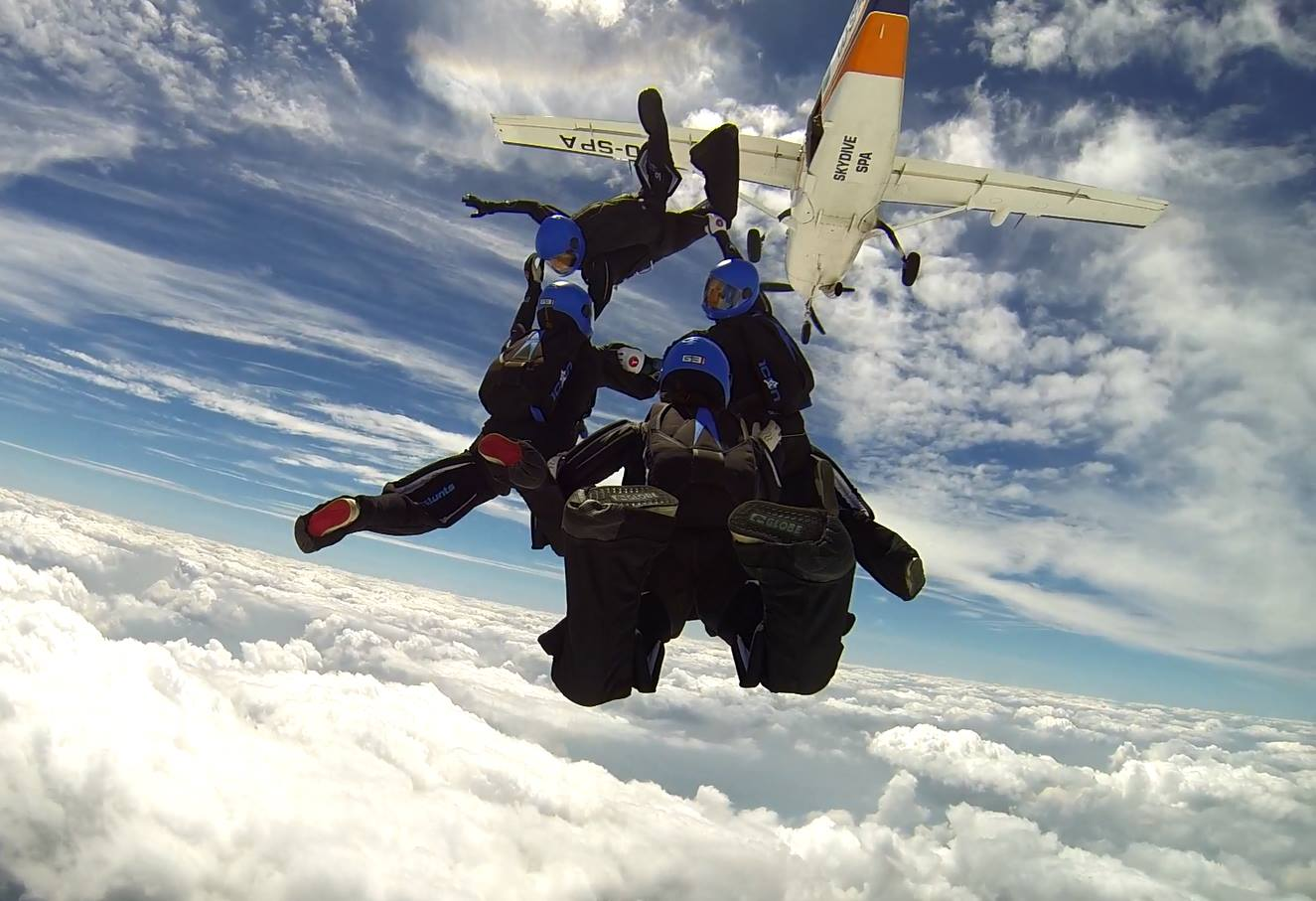 Sortie d'avion - équipe de VR4 Belge (Féminine) - Les Stunts